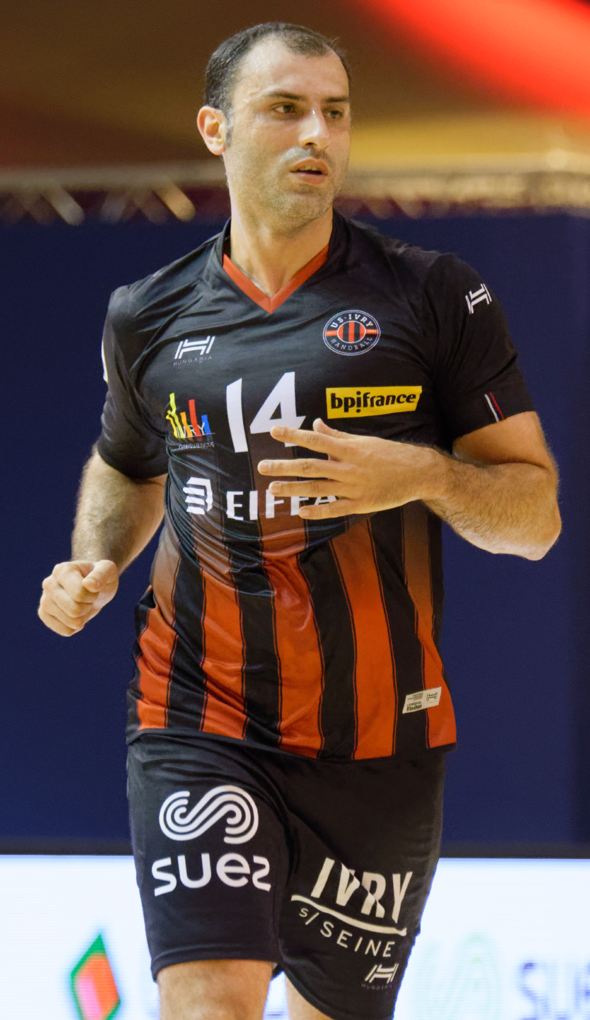 Rencontre du challenge Marrane 2016 entre l'US Ivry et les danois de IFK Kristianstad. A la Halle Carpentier (Paris 13e), le 04 septembre 2016.